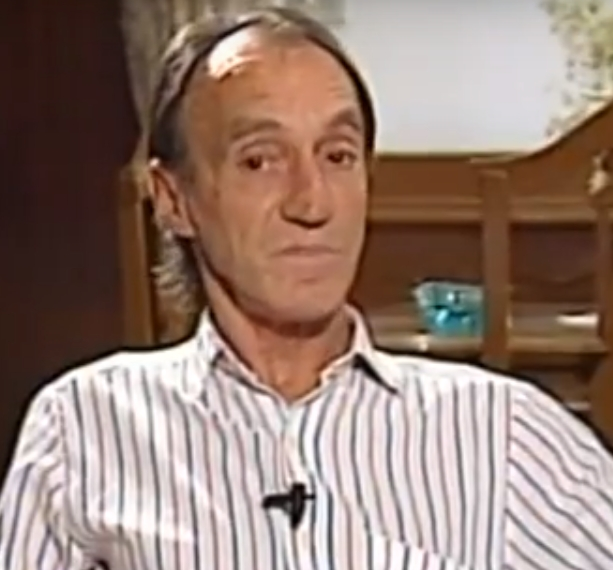 Foto de entrevista na TV Cultura